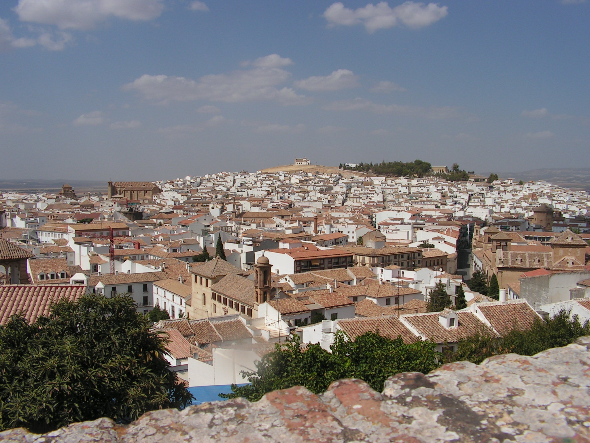 Uitzicht over de stad Antequera. Afbeelding gemaakt door Herman Kappen.